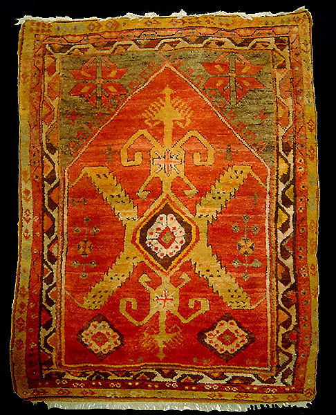 ковер с церковными крестами